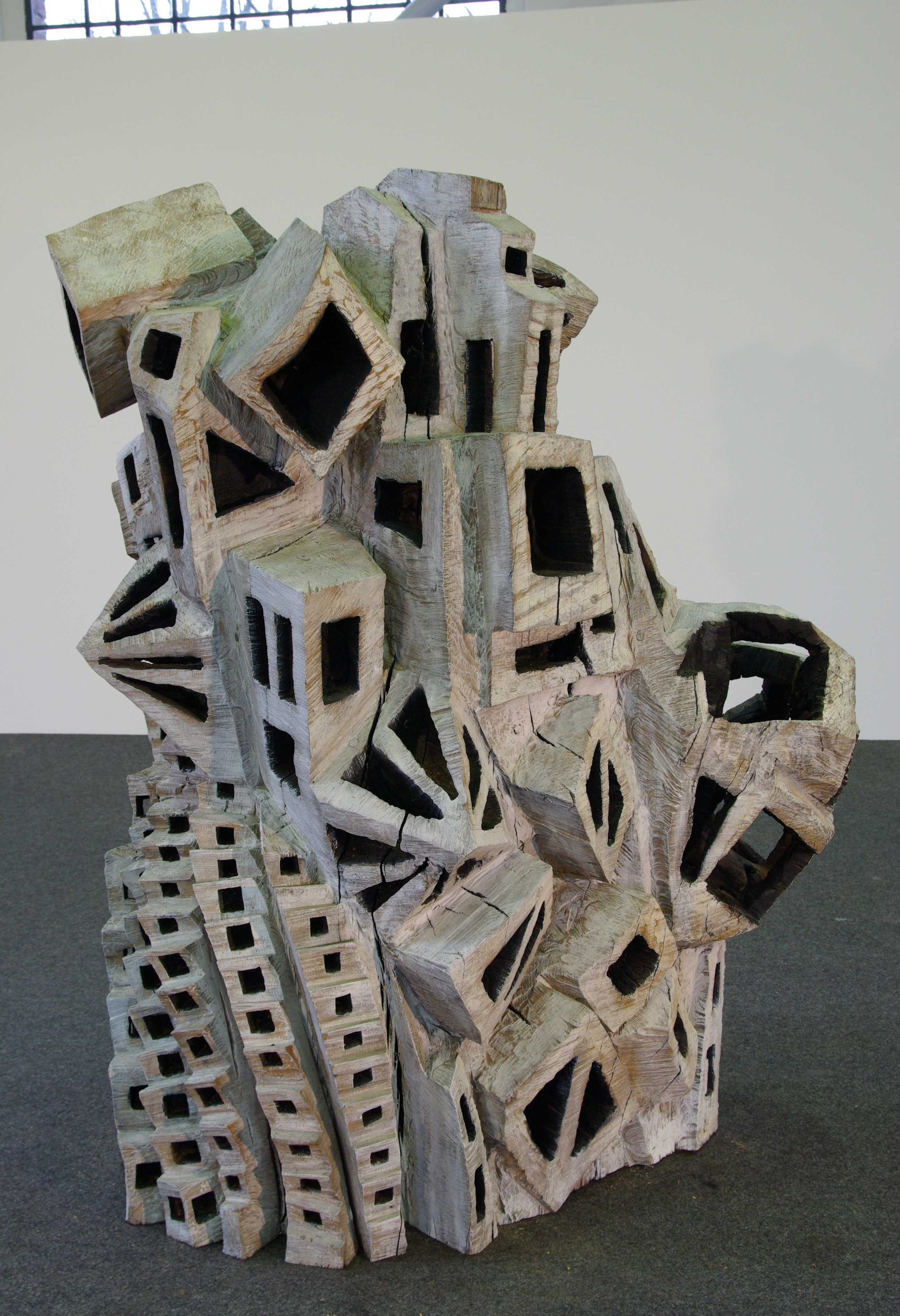 Urbaner Turm. 2003-07. Eichenstamm, partiell gebrannt, weiße Farbe, ca. 155 x 130 x 100 cm